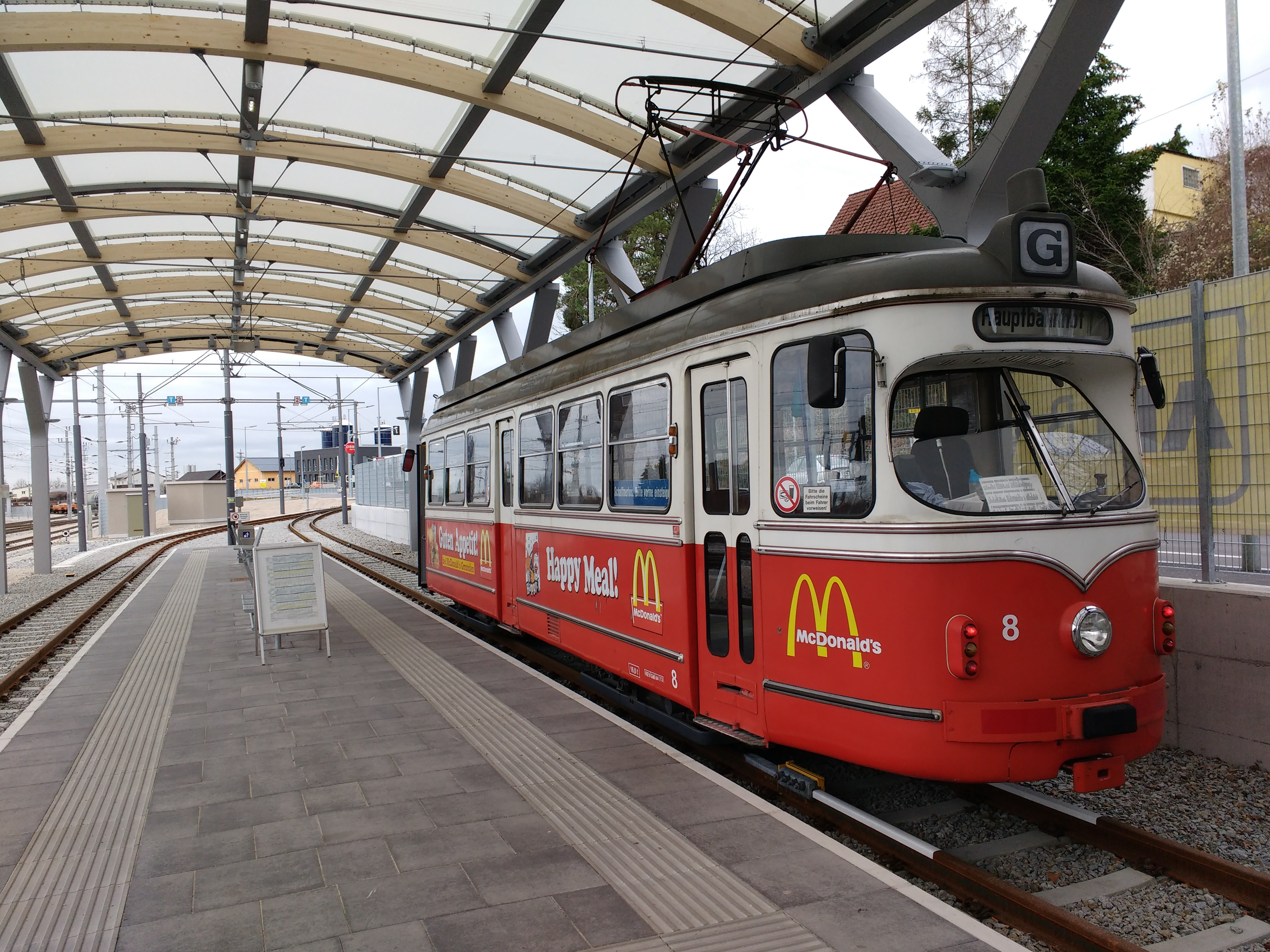 GM8 der Straßenbahn Gmunden an der neuen überdachten Endhaltestelle Bahnhof